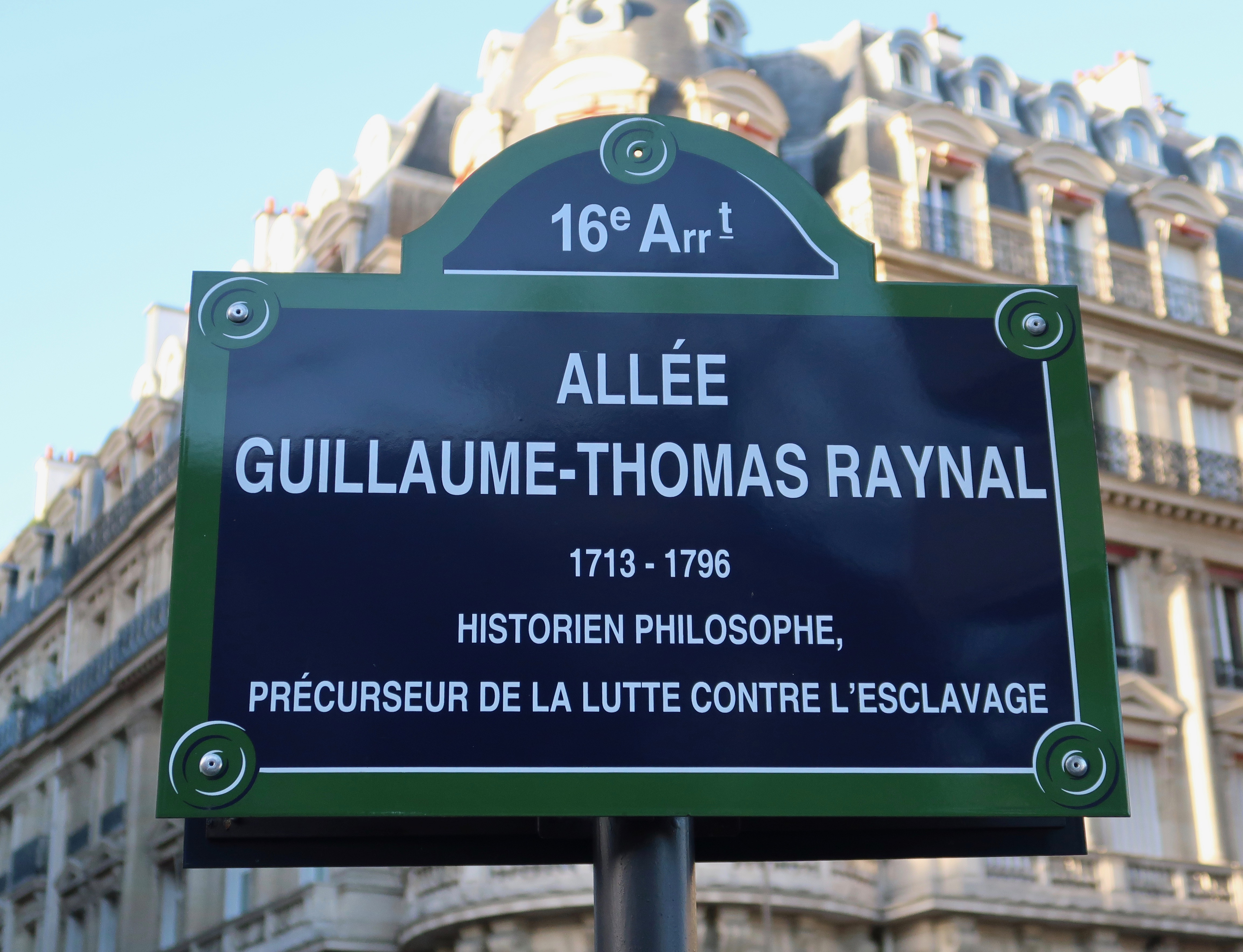 Plaque de l'allée Guillaume-Thomas-Raynal, au centre de l'avenue du Président-Wilson (Paris, 16e).